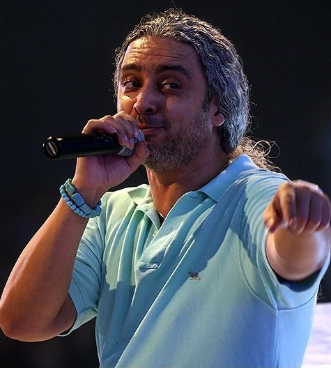 کنسرت مازیار فلاحی - کیش